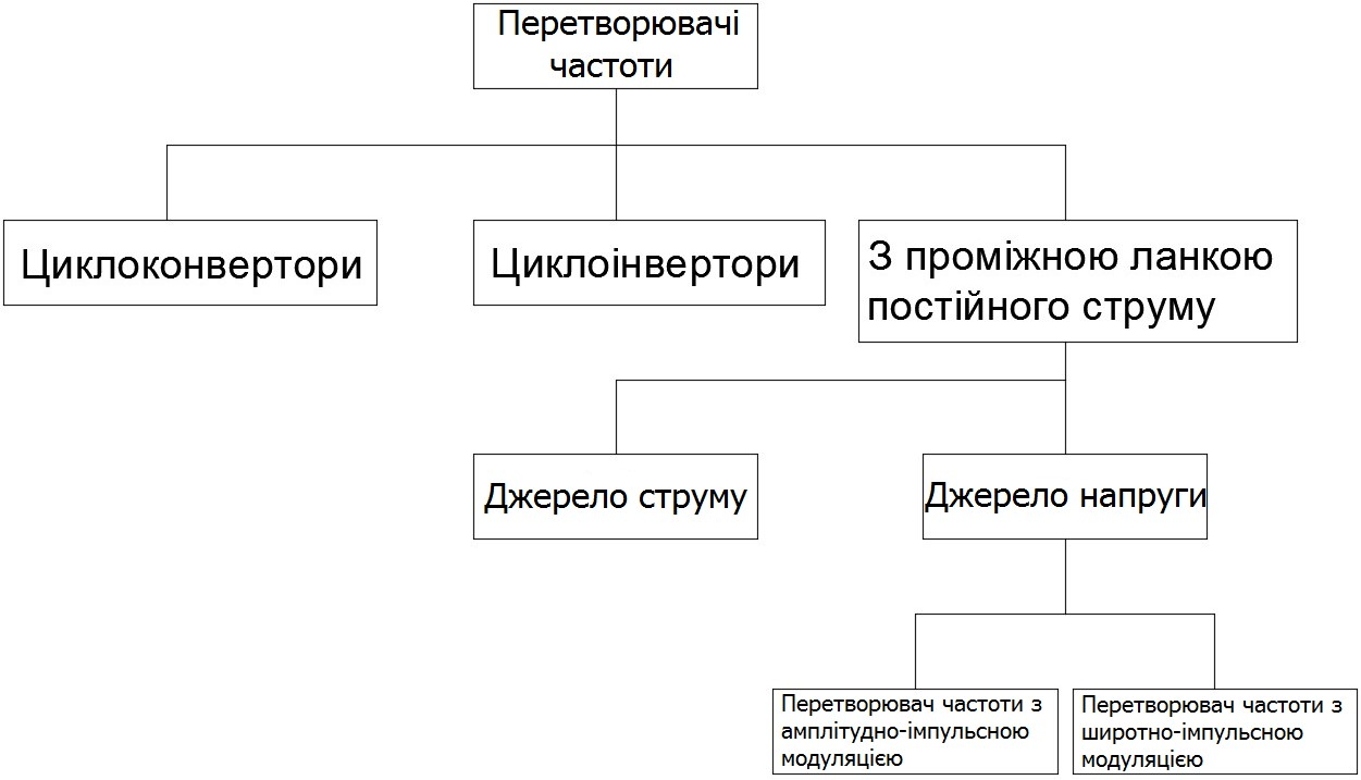 Классифікація ПЧ